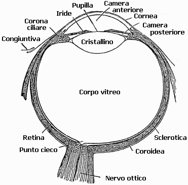 Occhio umano: spaccato Ripreso da de: Wiki (PD); modificato da me per italianizzare la parte testuale.